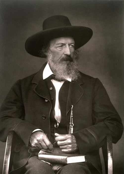 Alfred Tennyson, 1. Baron Tennyson (* 8. August 1809 in Somersby, Lincolnshire; † 6. Oktober 1892 in Aldworth bei Reading) war ein englischer Dichter des Viktorianischen Zeitalters.